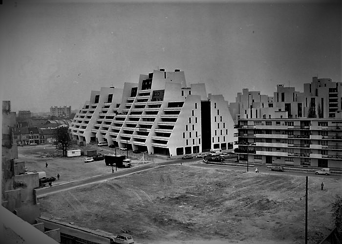 Cité de France à Houilles. Zone a Urbaniser en priorité.